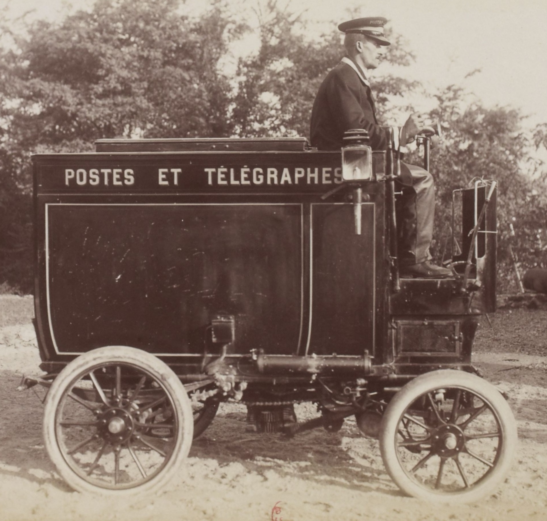 [Collection Jules Beau. Photographie sportive] : T. 16. Années 1901 et 1902 / Jules Beau : F. 13. Concours de l'alcool, épreuves des automobiles, 30 octobre 1901